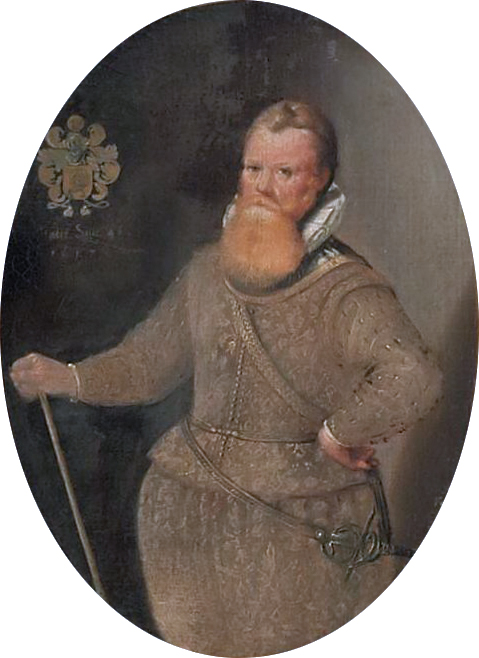 Frederik de Houtman, fragment from a map of Ambon by David de Meyne